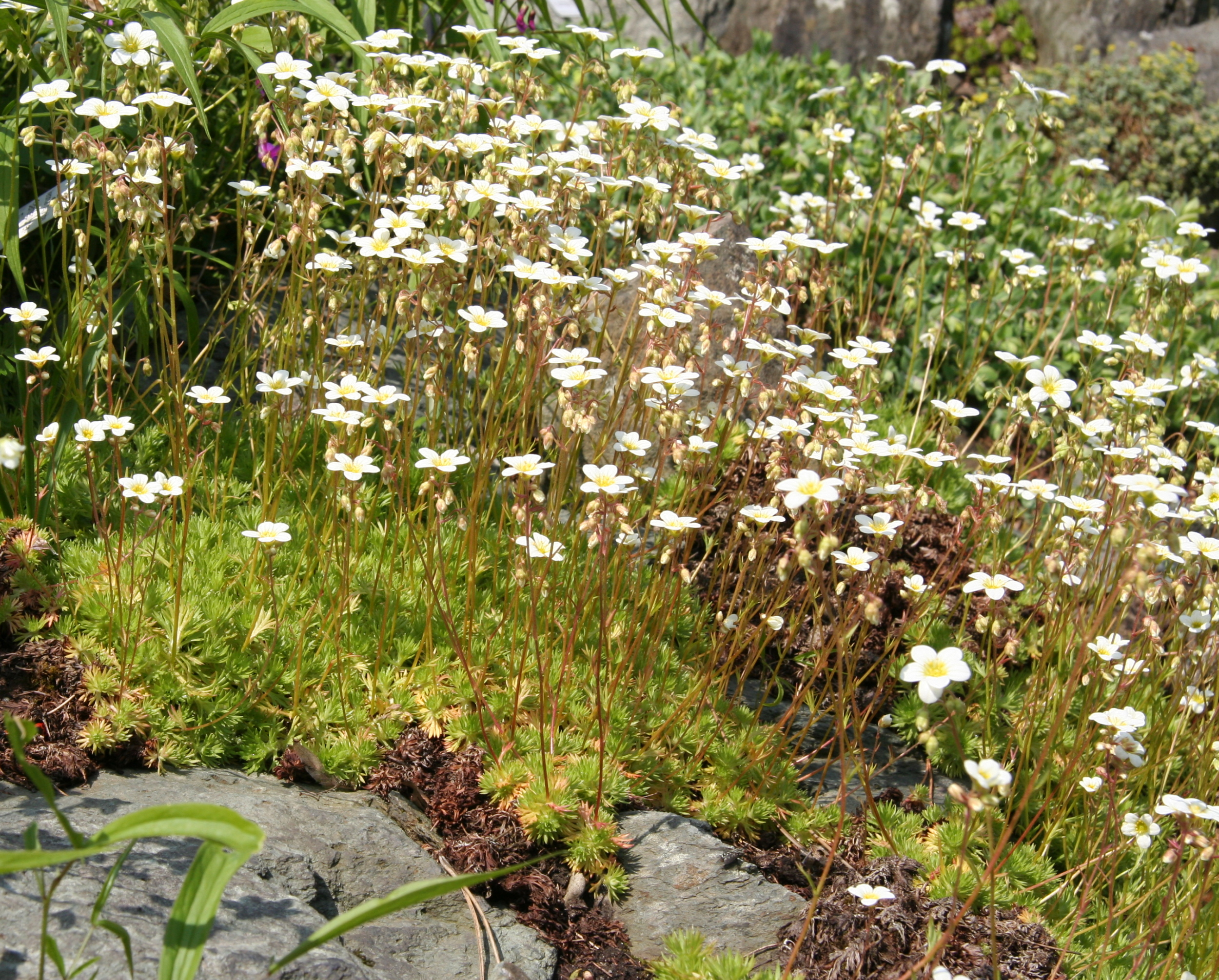 Saxifraga rosacea im Botanischen Garten Dresden